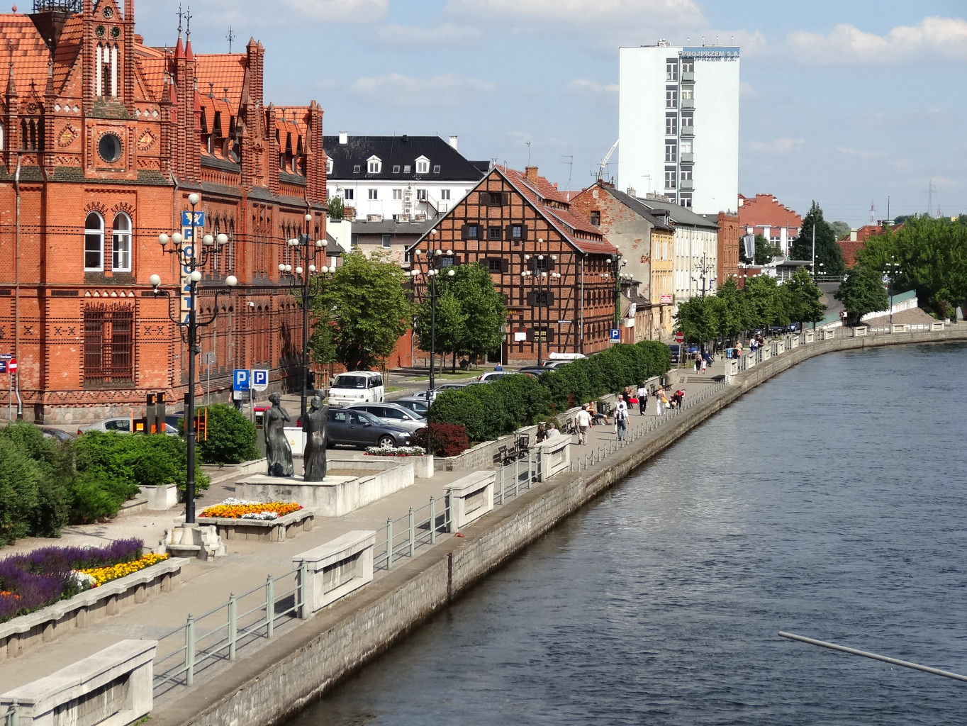 Północne nabrzeże Brdy w centrum Bydgoszczy - bulwar im. Zbigniewa Urbanyi